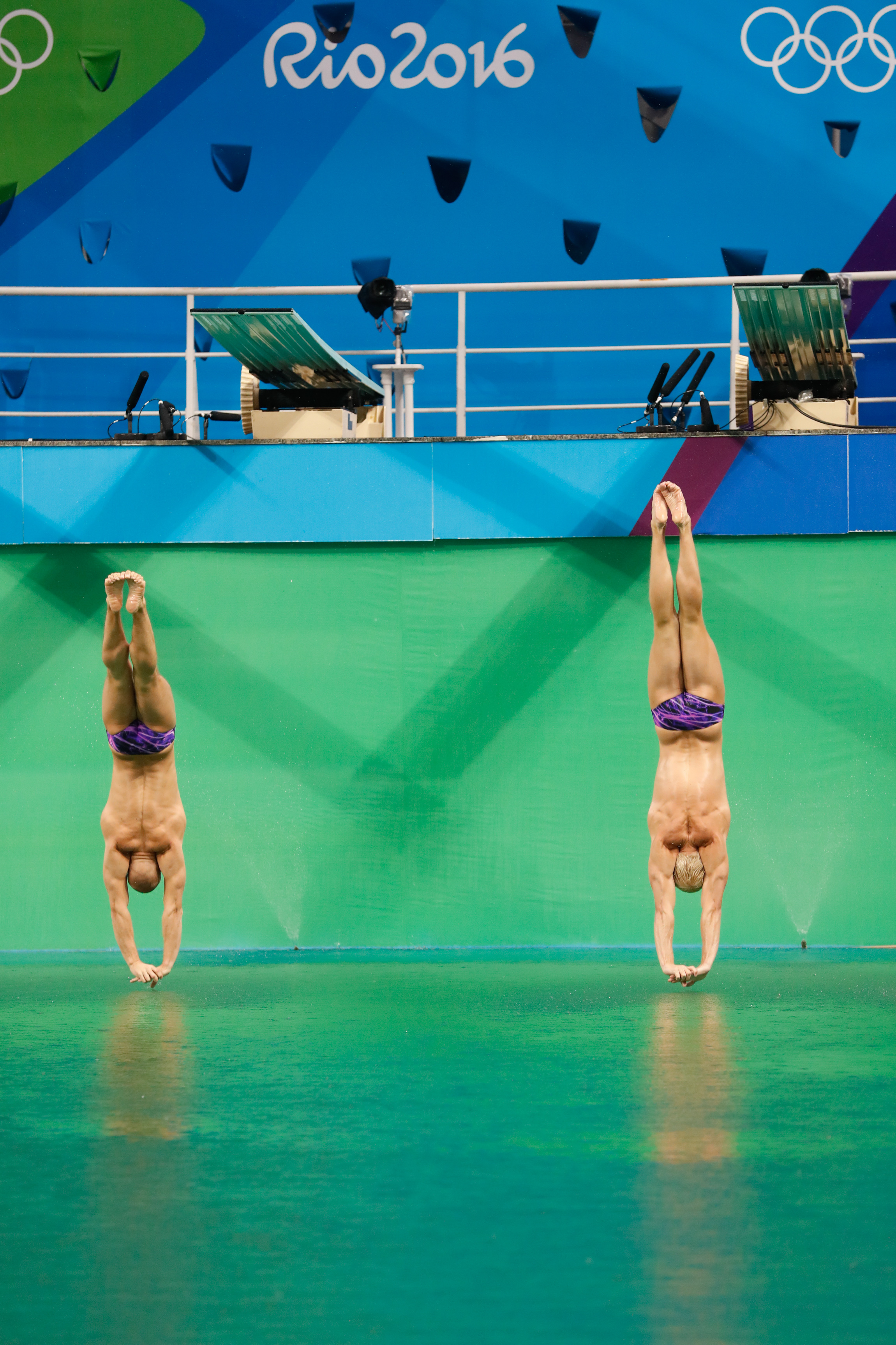 Rio de Janeiro - Russos Evegenil Kuznetov e Ilia Zakharov competem no trampolim de 3 metros sincronizado dos saltos ornamentais nos Jogos Olímpicos Rio 2016, no Parque Aquático Maria Lenk (Fernando Frazão/Agência Brasil)